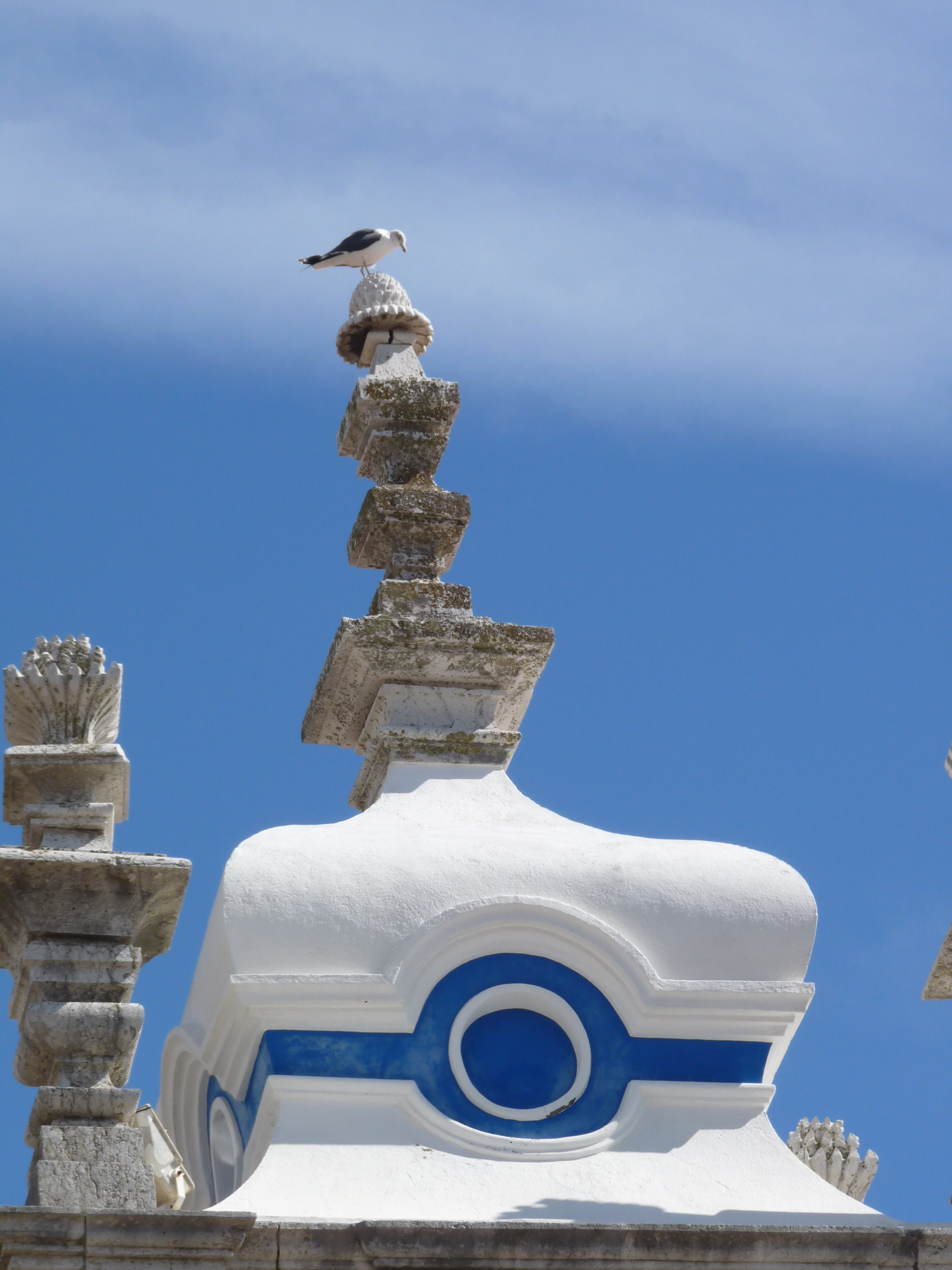 Gaivota comum no telhado da Igreja Matriz de Santiago em Sesimbra